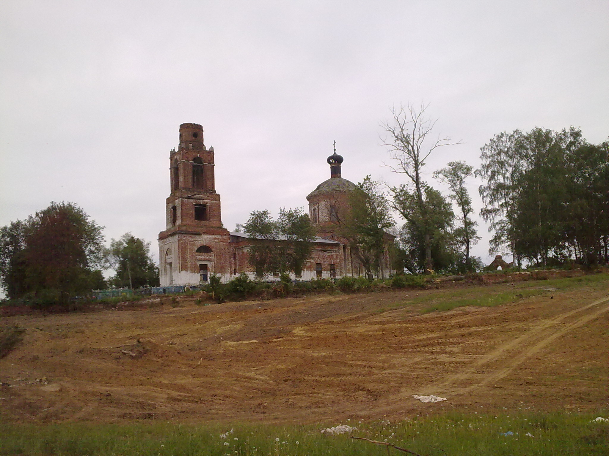 Церковь